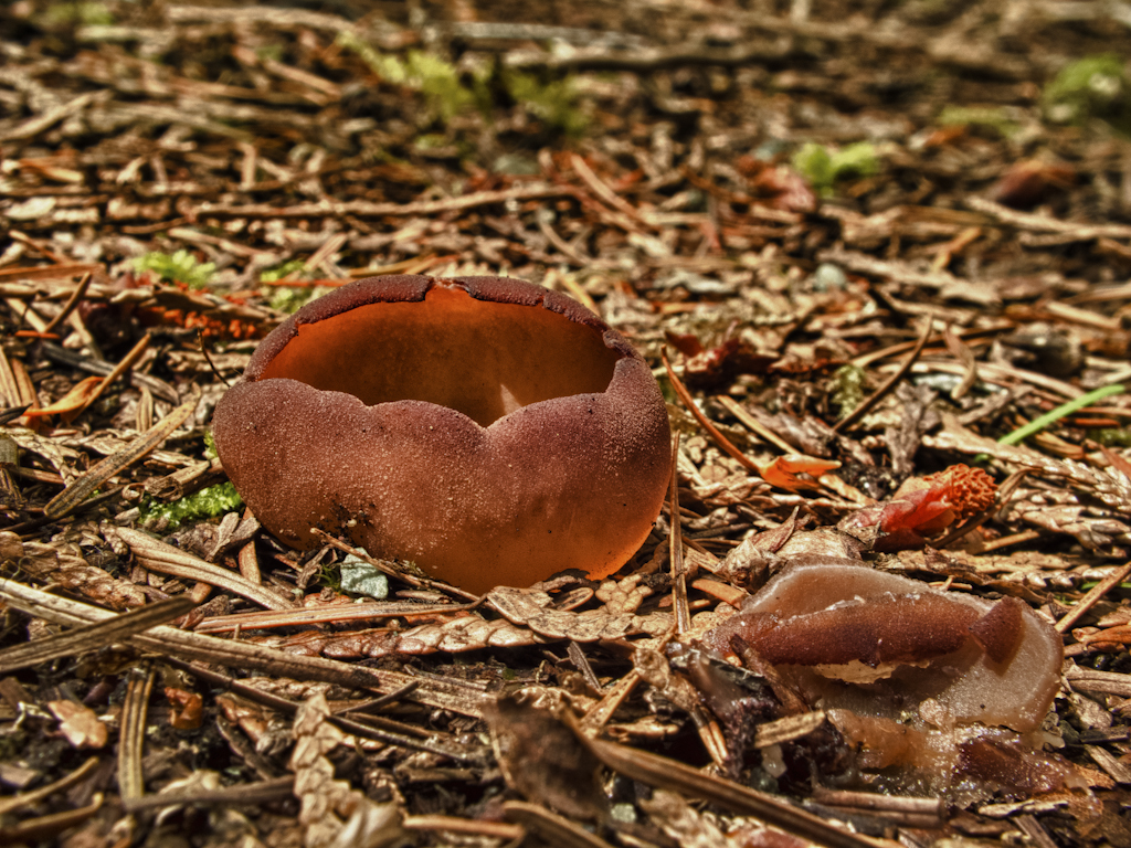 Peziza badio-confusa_HDR